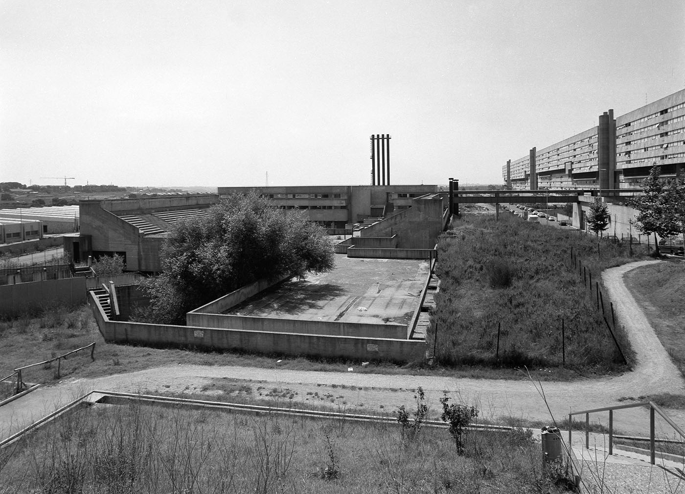 Corviale Arena esterna 1988